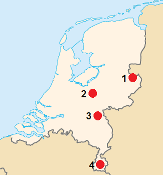 Kerngebieden verspreiding vliegend hert Lucanus cervus